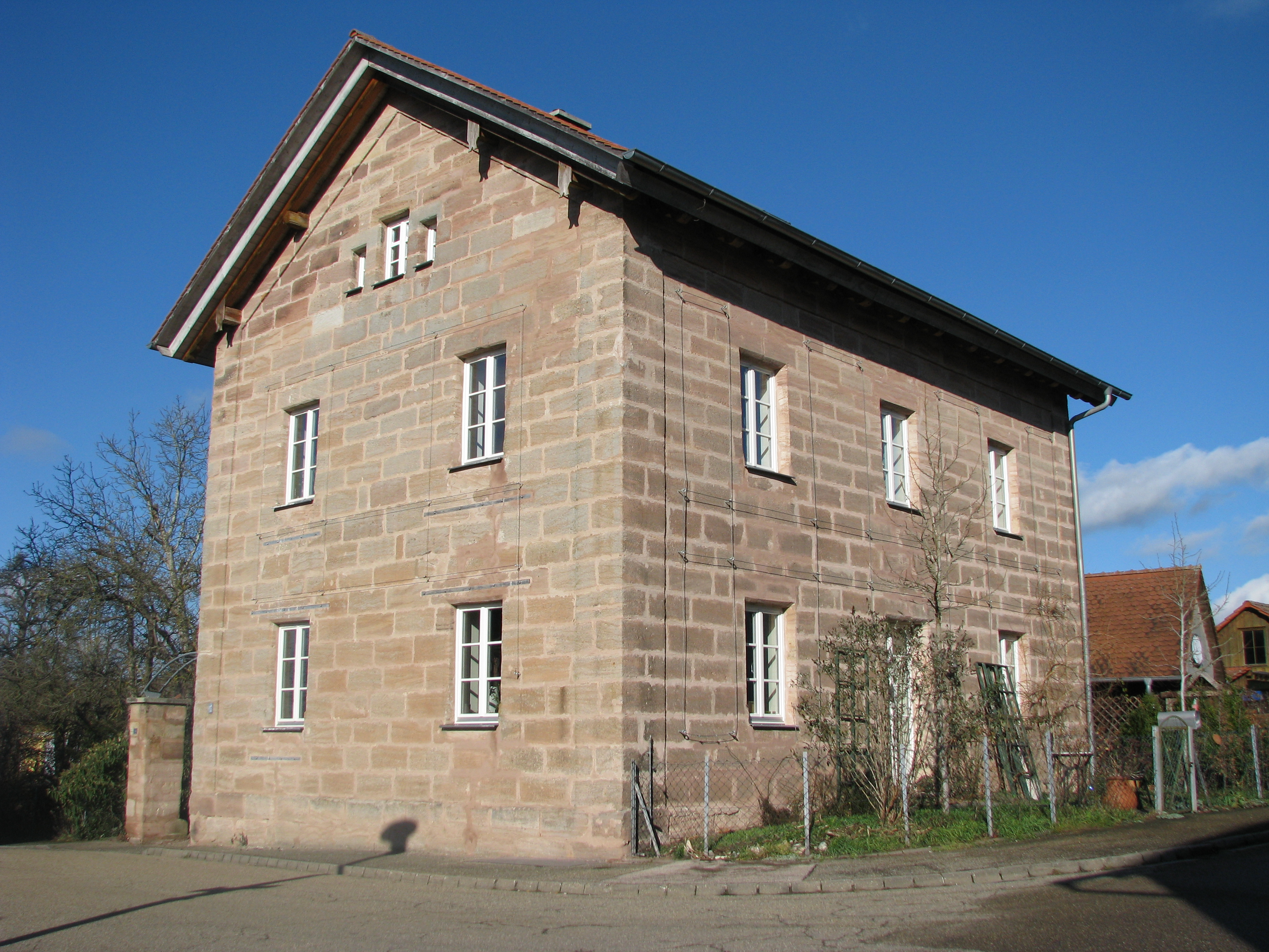 Heuberg, Ortsteil von Hilpoltstein im mittelfränkischen Landkreis Roth in Bayern, Gebäude aus Sandsteinquadern